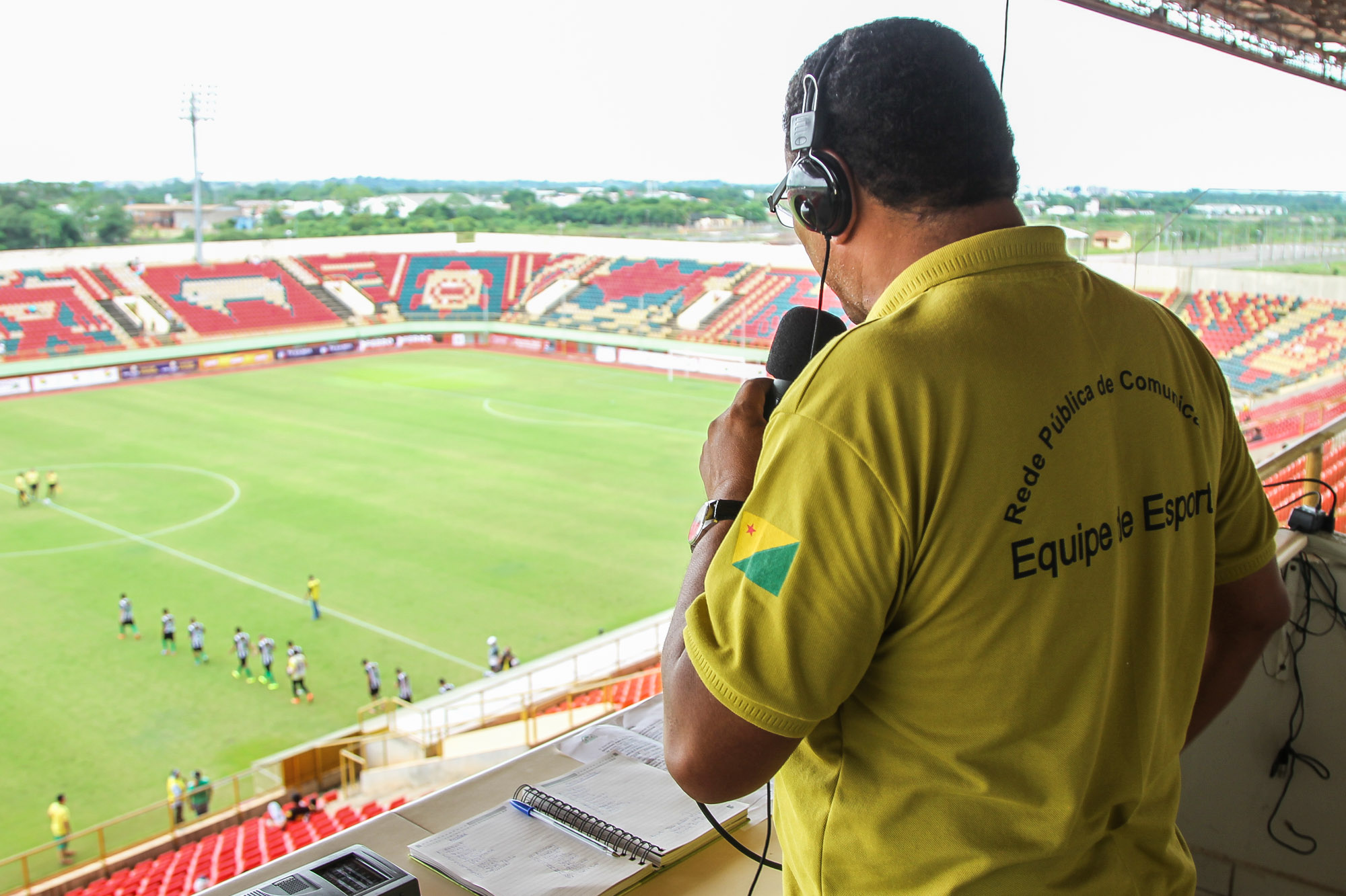 Fotos: Arison Jardim/Secom